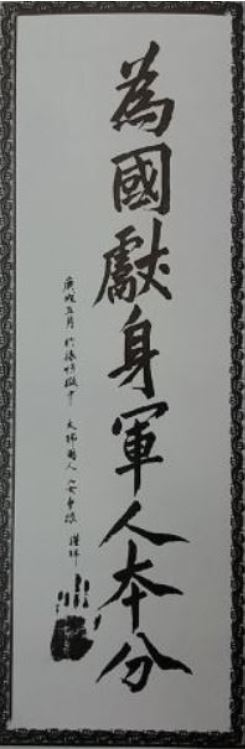 安重根遗墨：“为国献身军人本色”